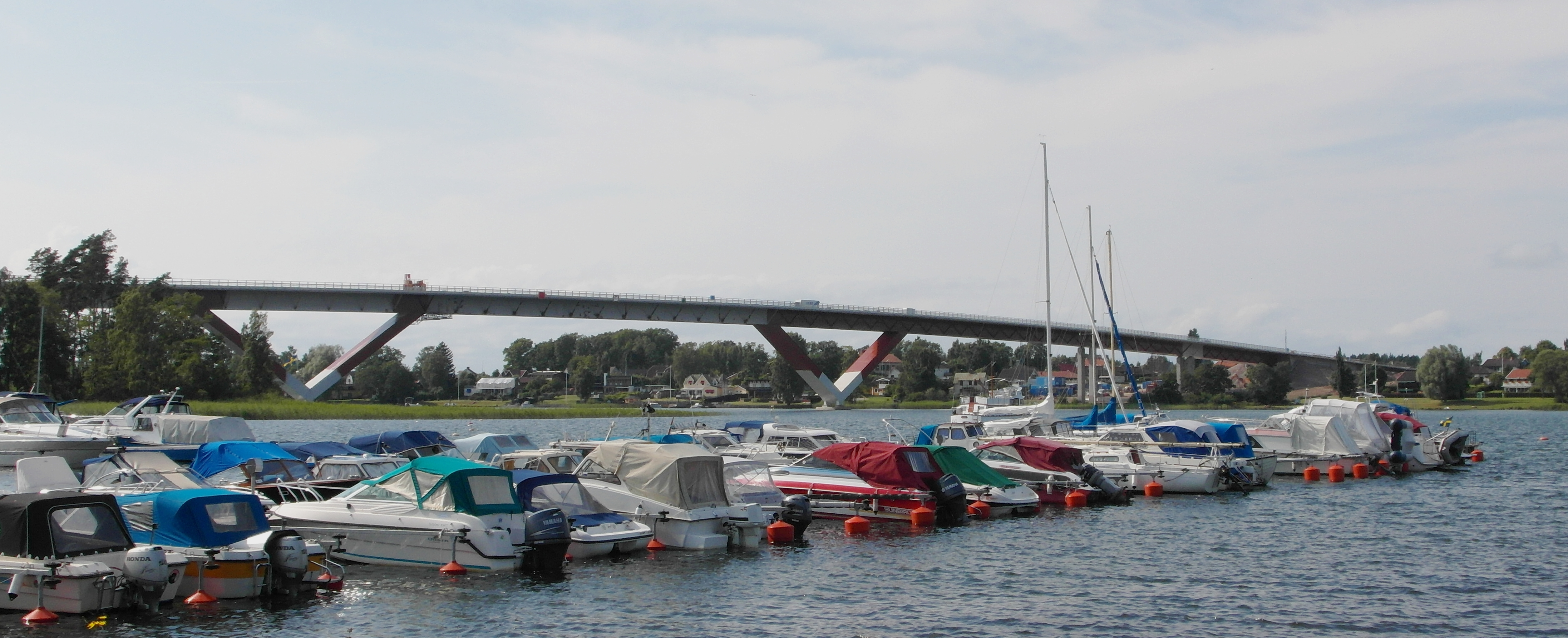 Nya Motalabron under byggnad, 14 juli 2013. Vy från södra stranden av Motalaviken.